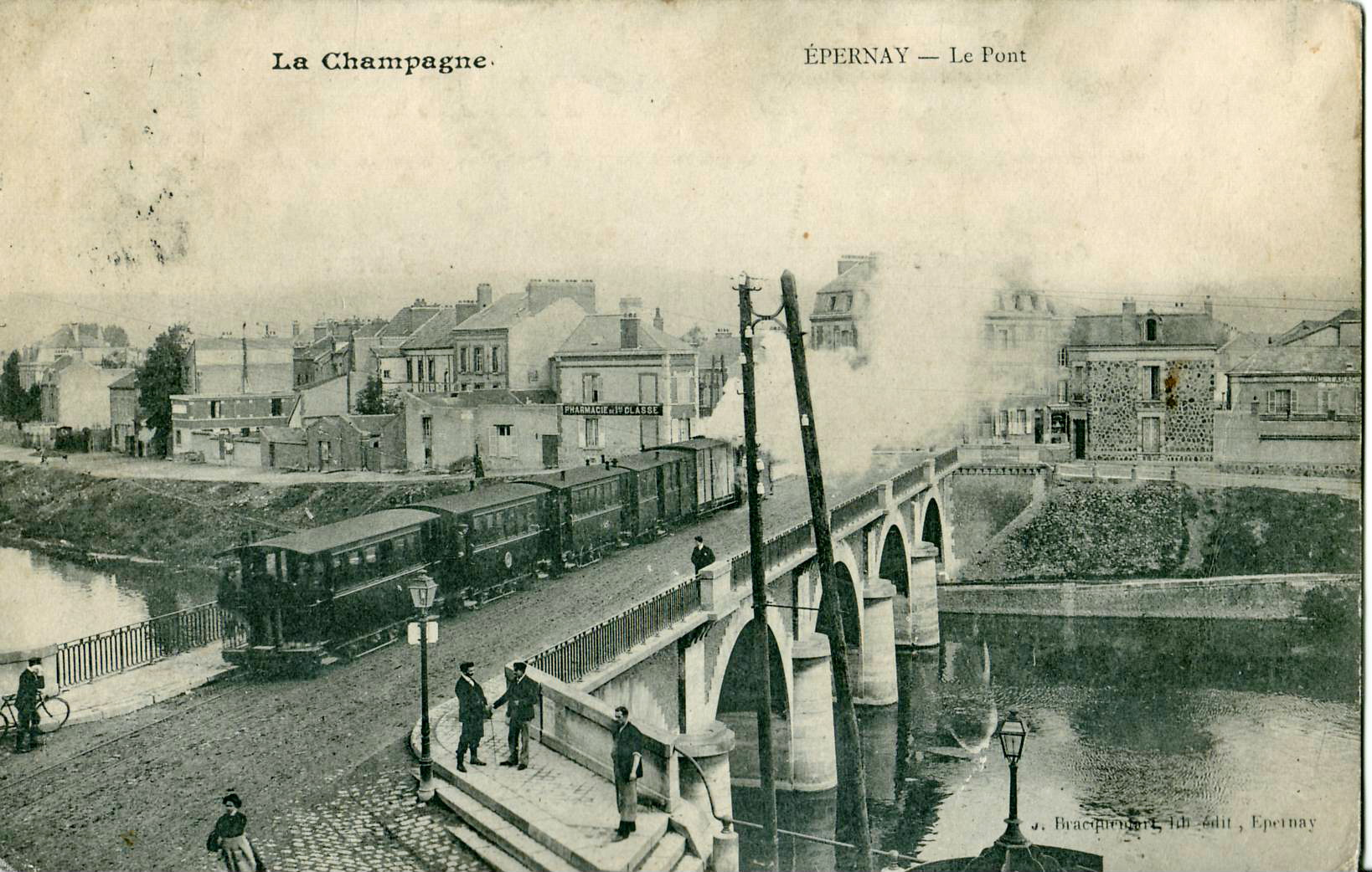 Carte postale ancienne éditée par Bracquemont à ÉpernayLa Champagne : ÉPERNAY - Le PontLe Pont d'Épernay sur la Marne, sur lequel passe un convoi des Chemins de fer de la Banlieue de Reims